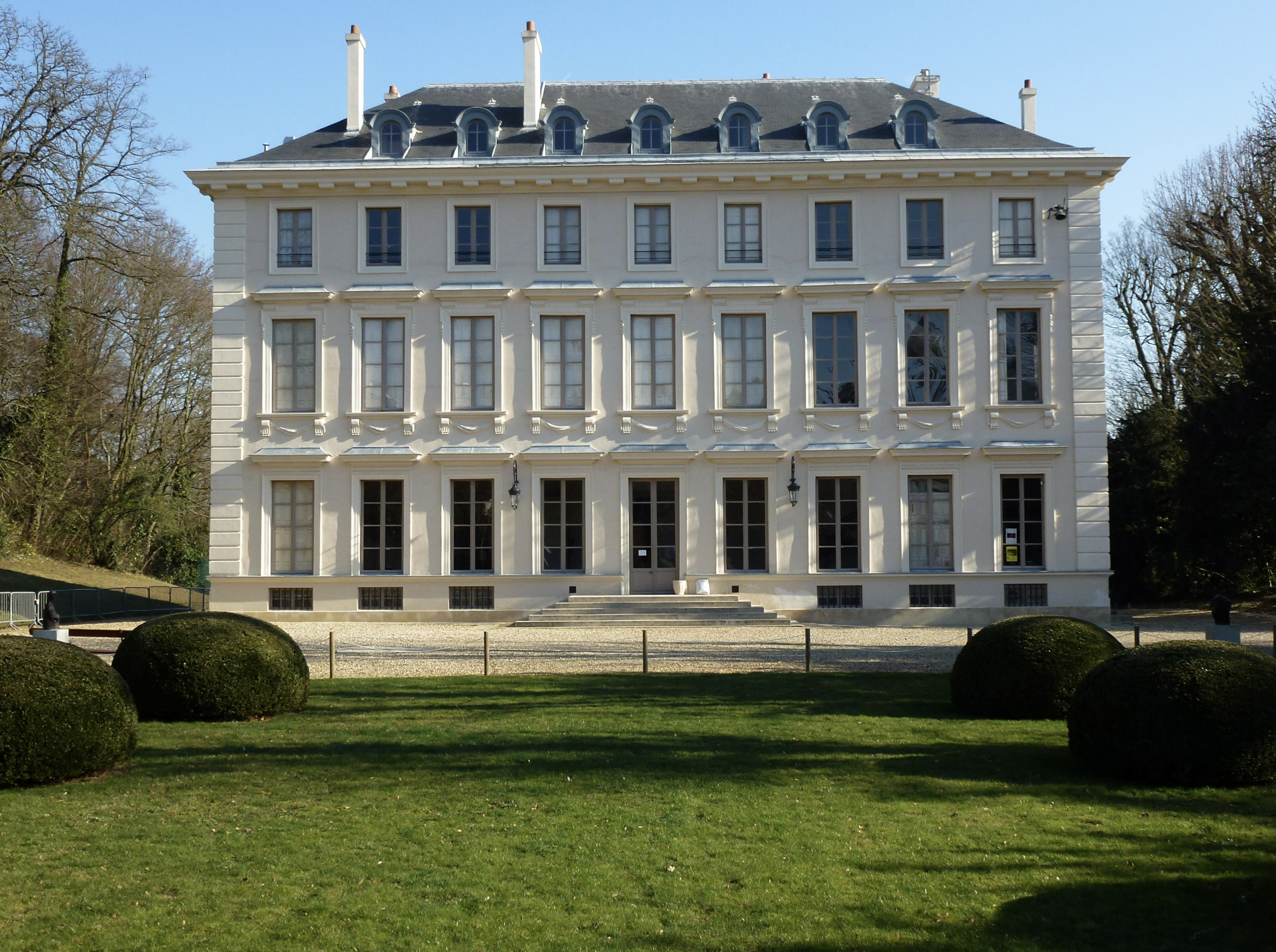 Château de Thierry à Ville-d'Avray dans les Hauts-de-Seine